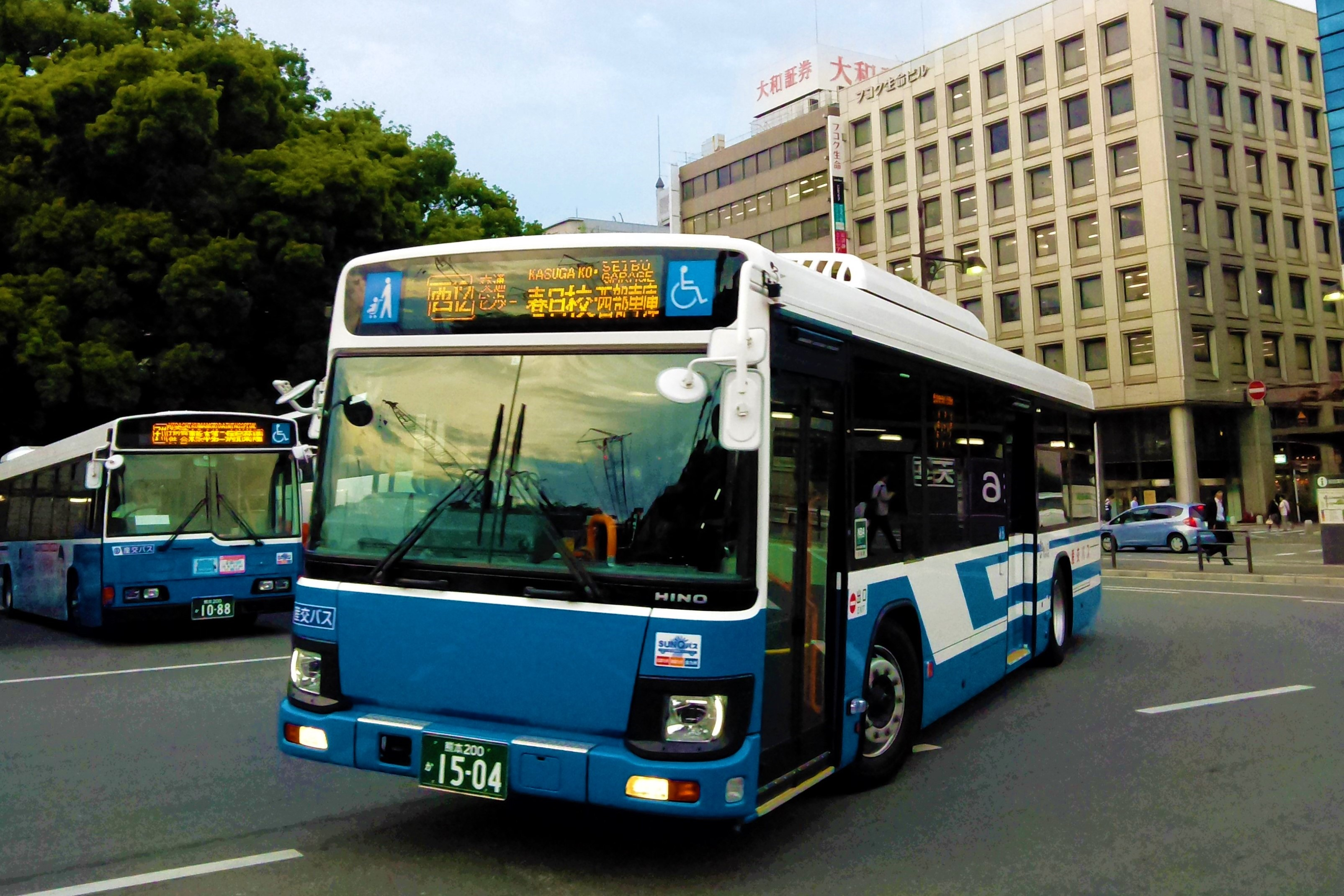 九州産交バス1504号車（日野2KG-KV290N2）を熊本市中央区にて撮影